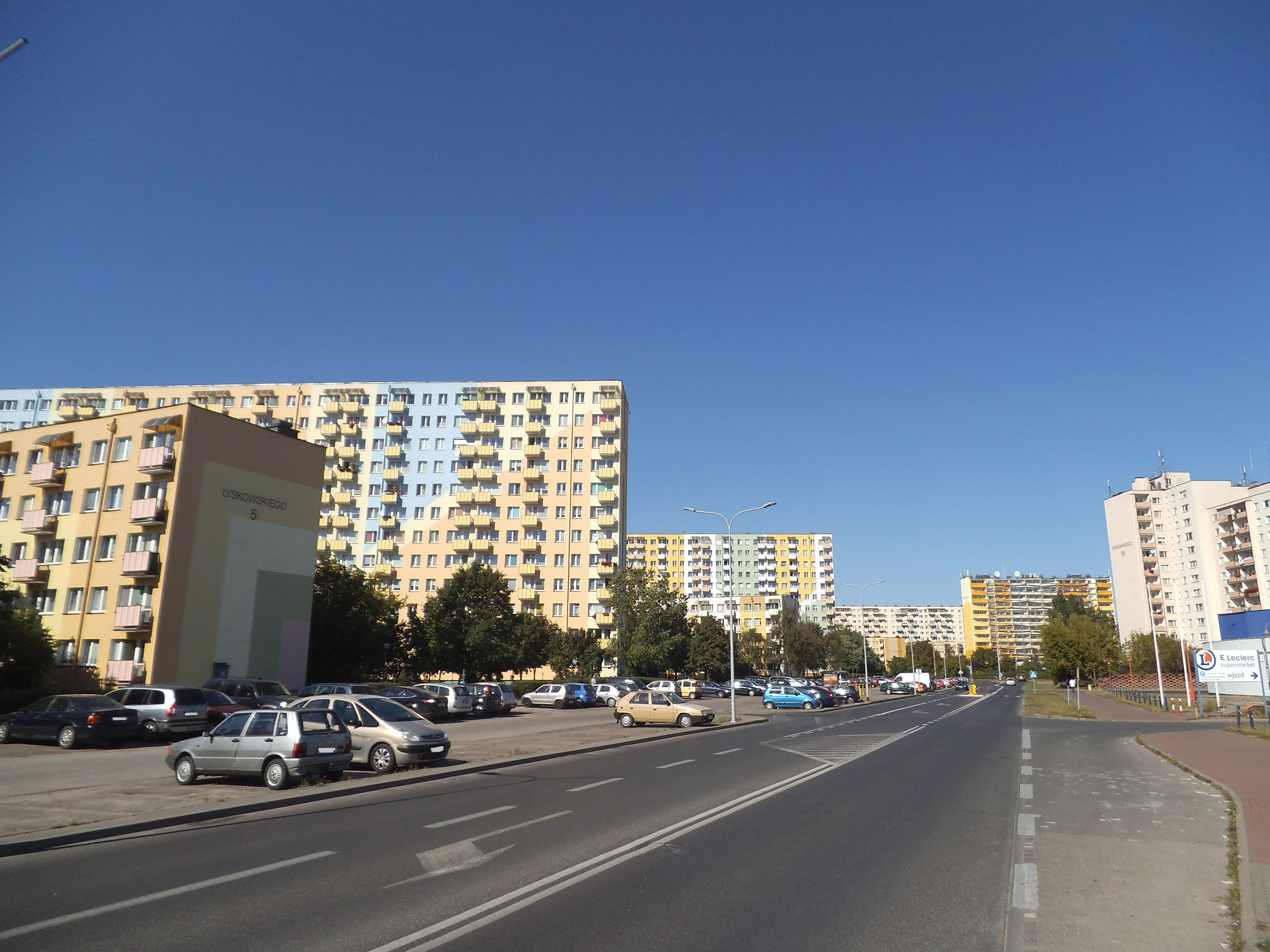 Fragment ulicy Łyskowskiego w Toruniu